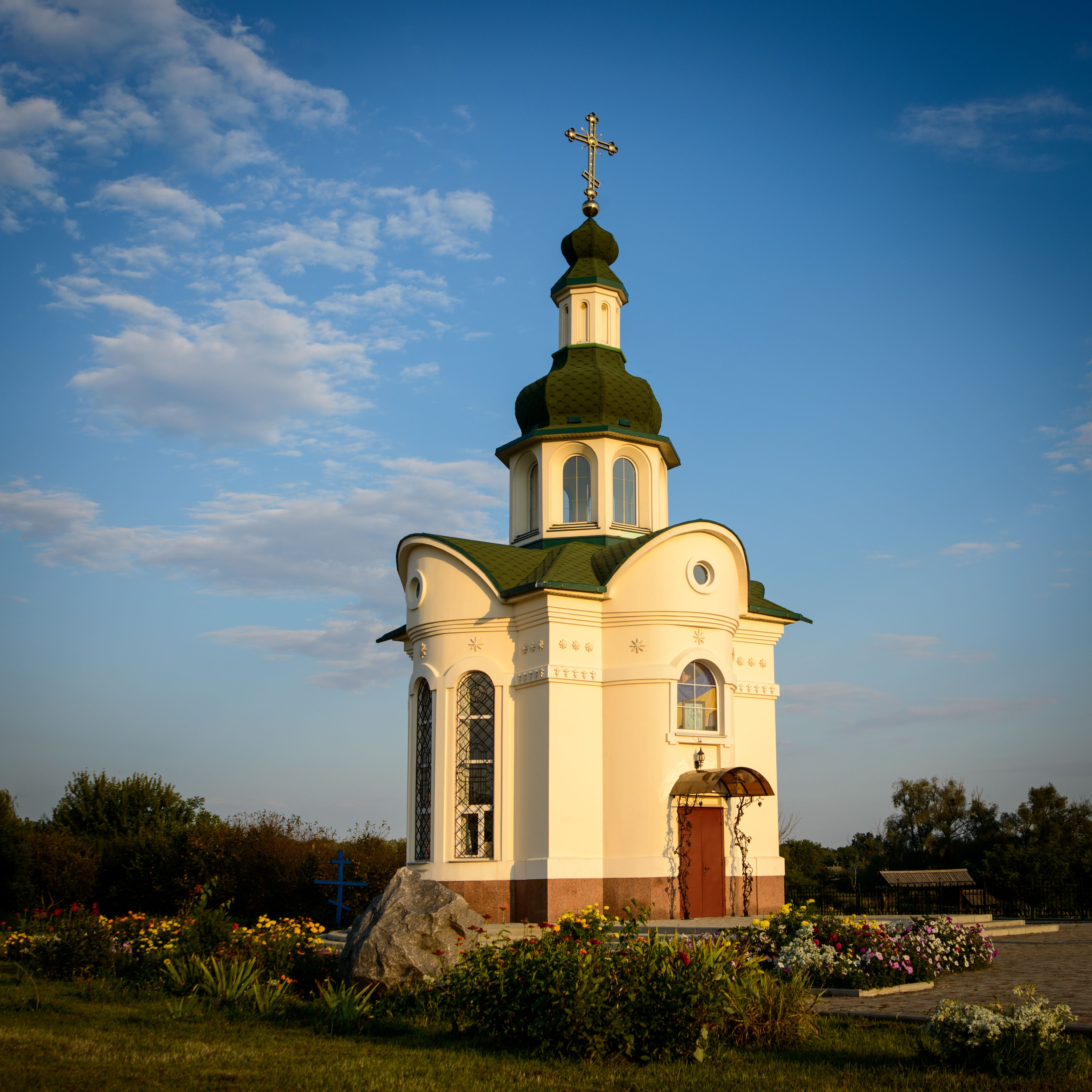 Меморіальний комплекс пам’яті загиблих козаків:, с. Жуки, центр